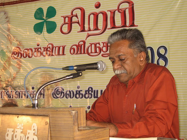 தமிழின் புகழ்பெற்ற கவிஞர் சுகுமாரன்.